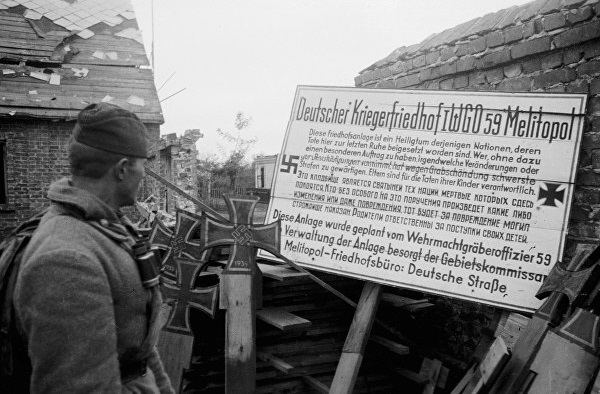 Советский солдат читает надпись на немецком указателе: «Это кладбище является святыней тех наций, мертвые которых здесь покоятся. Кто без особого на это поручения произведет какие либо изменения или даже повреждения, тот будет за повреждение могил строжайше наказан. Родители ответственны за поступки своих детей».